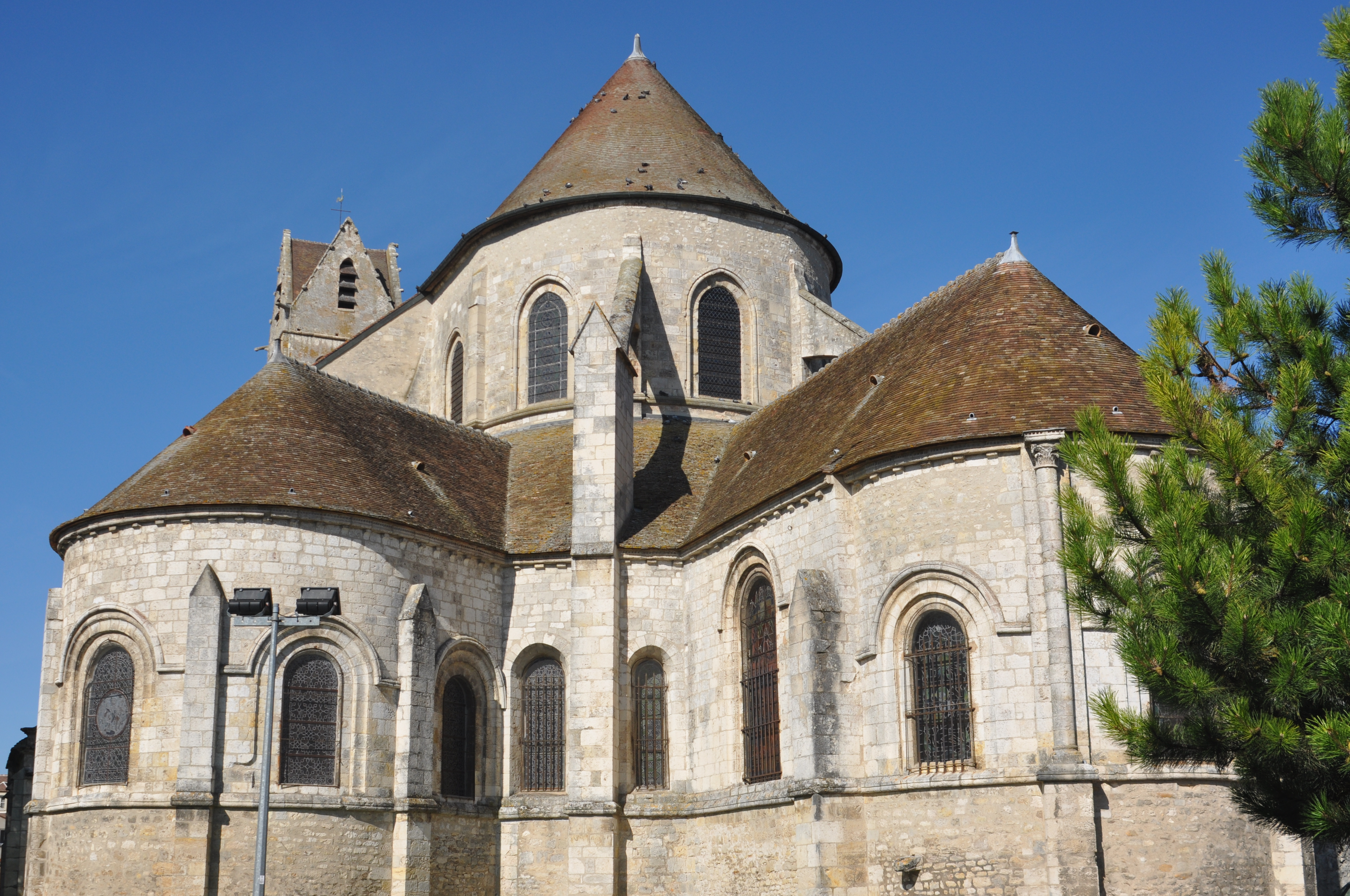 Extérieur. Collégiale Saint-Martin à Étampes (Essonne, France)